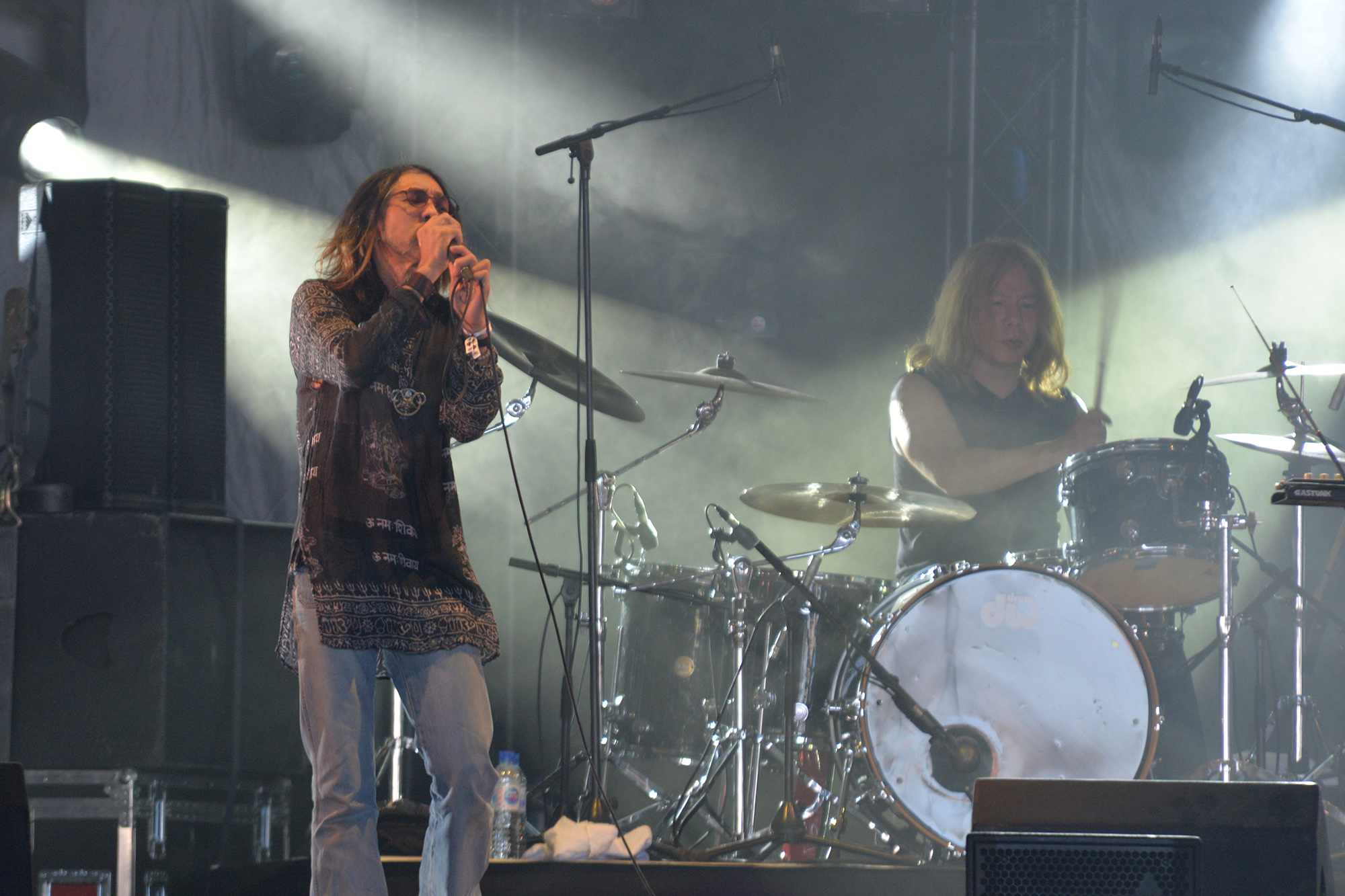 Concert du groupe japonais Church of Misery sur la scène Valley, Hellfest 2018.